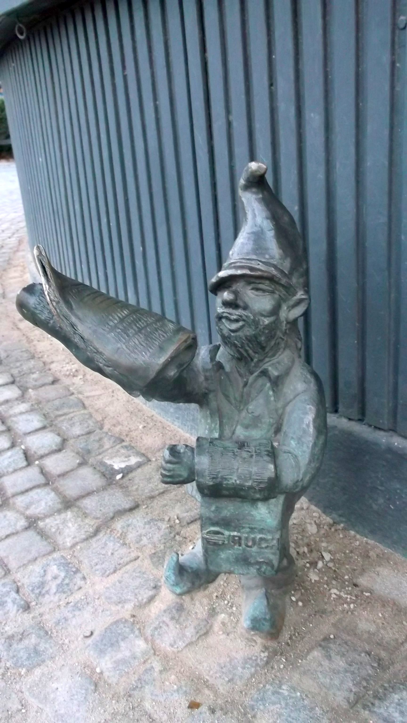 Gazeciarz-wrocławski krasnal z pl. Kościuszki autorstwa Małgorzaty Kaszyńskiej